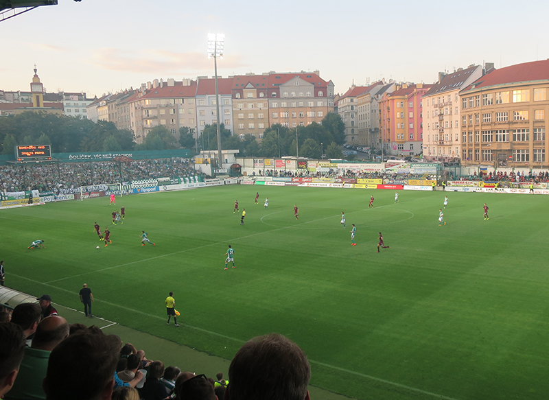 Alžběta Blažková